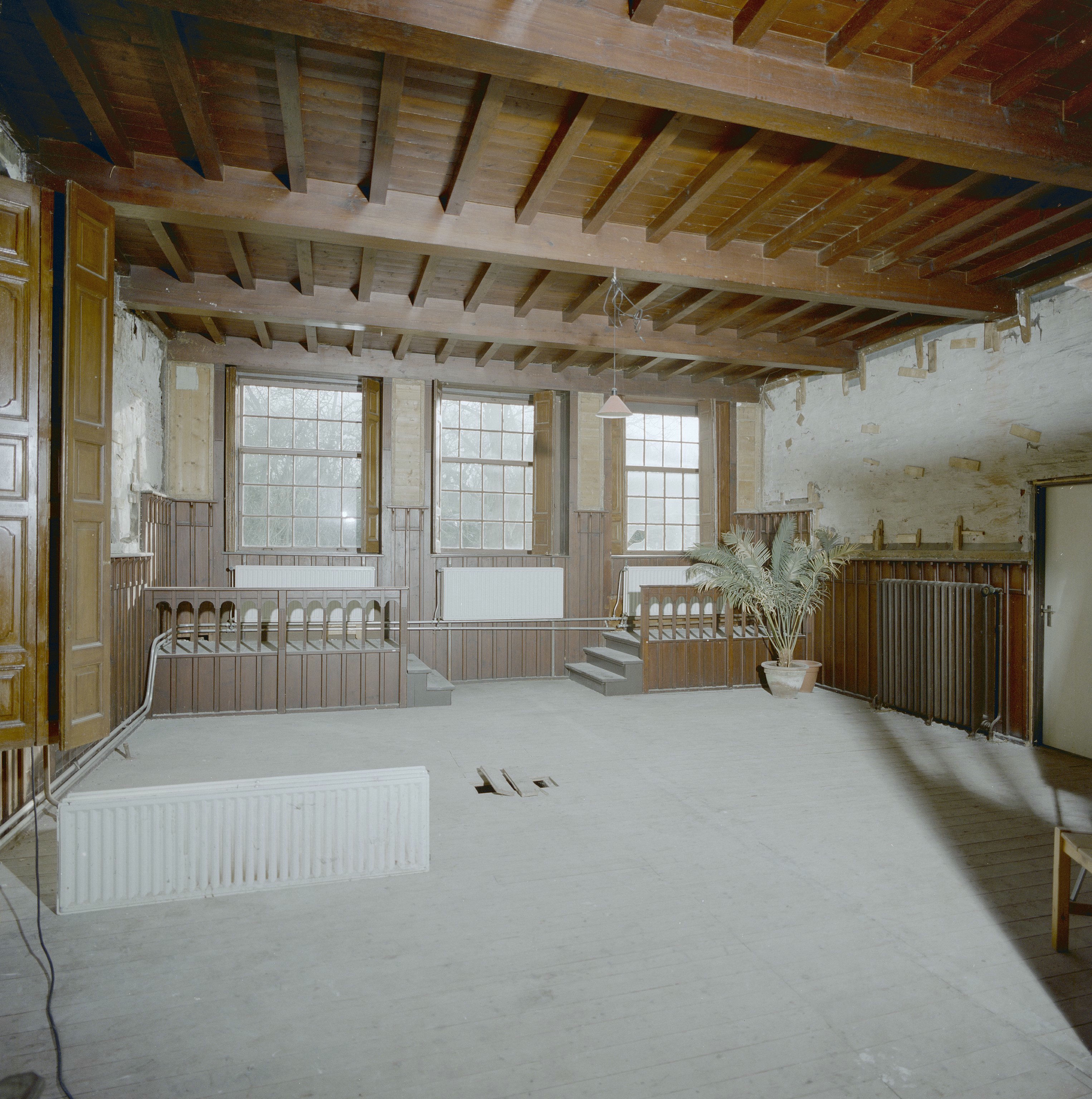 Interieur, zuidvleugel, voormalig biljartkamer / oranjerie